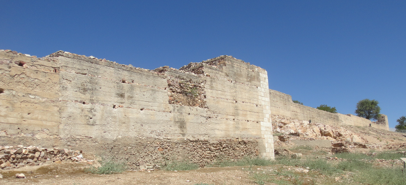 Muralla del Castillo de Alarcos en la Provincia de Ciudad Real (Castilla-La Mancha - España). Rodeaba a la ciudad medieval y al castillo, de 3 metros de ancho, construida con diversas técnicas (manpostería, tapiales y esquinas reforzadas con sillares) mandada edificar por Alfonso VIII, quedando inconclusa en 1195, por la Batalla de Alarcos.